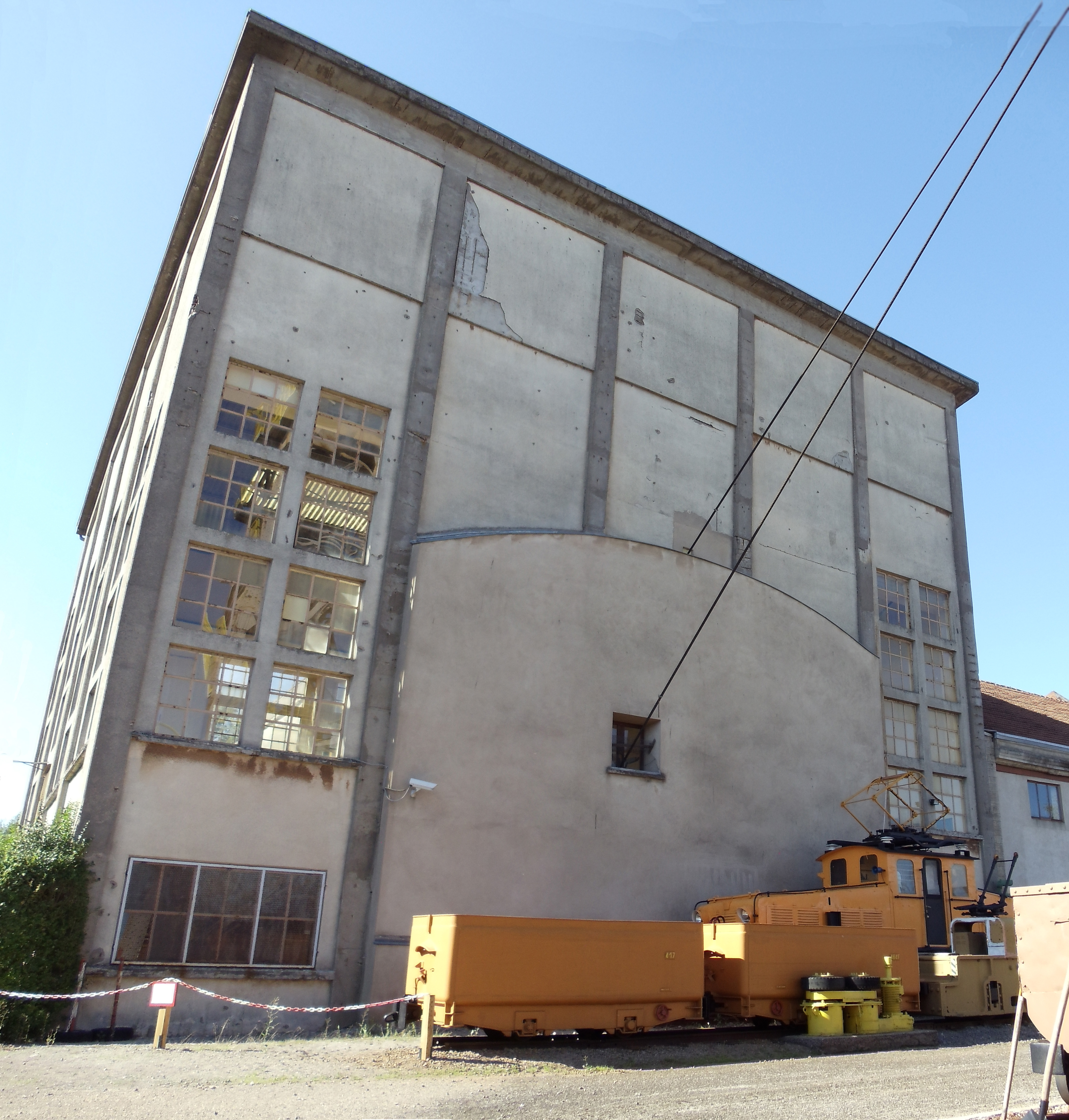 Le bâtiment des machines de la mine.